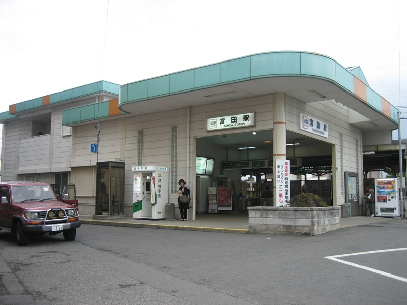 近鉄富田駅の駅舎。2006年1月4日に投稿者が撮影。 Category:鉄道駅画像 Category:近畿日本鉄道の画像 Category:四日市市の画像